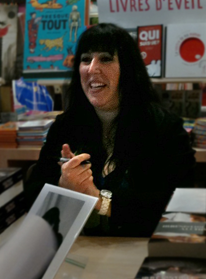 Simone elkeles au salon du livre 2012